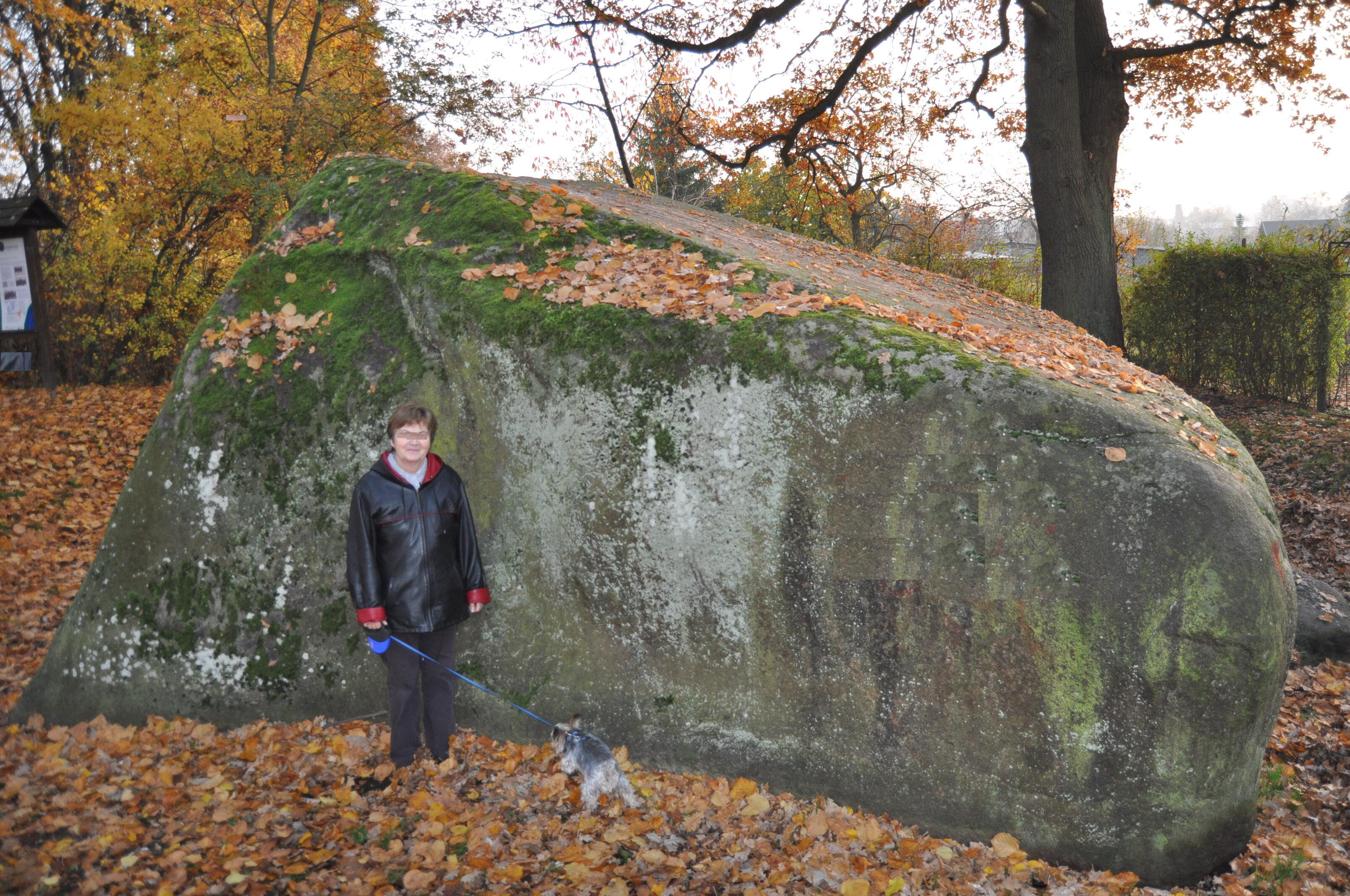 Großer Stein Altentreptow (Größenvergleich und ohne Wasser)